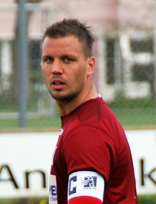 Fodboldspilleren Kim Aabech fra Lyngby Boldklub. Her under en reservekamp mod Viborg FF på Viborgs træningsanlæg på Kirkebækvej.